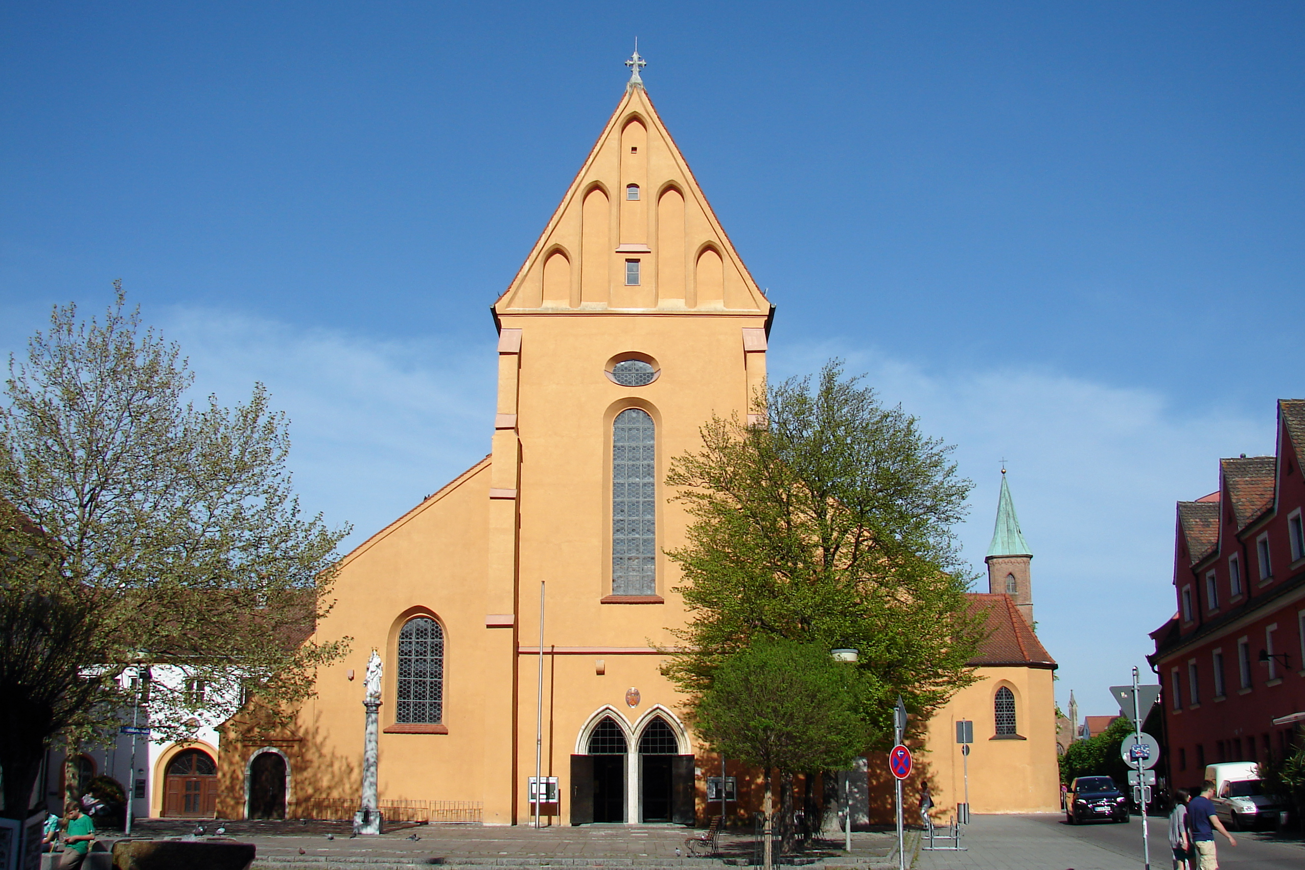 Ehemaliges Minoriten- und Franziskaner- jetzt Kapuzinerkloster Mariä Himmelfahrt, als Gründung Herzog Ludwigs II. des Strengen 1275 begonnen.